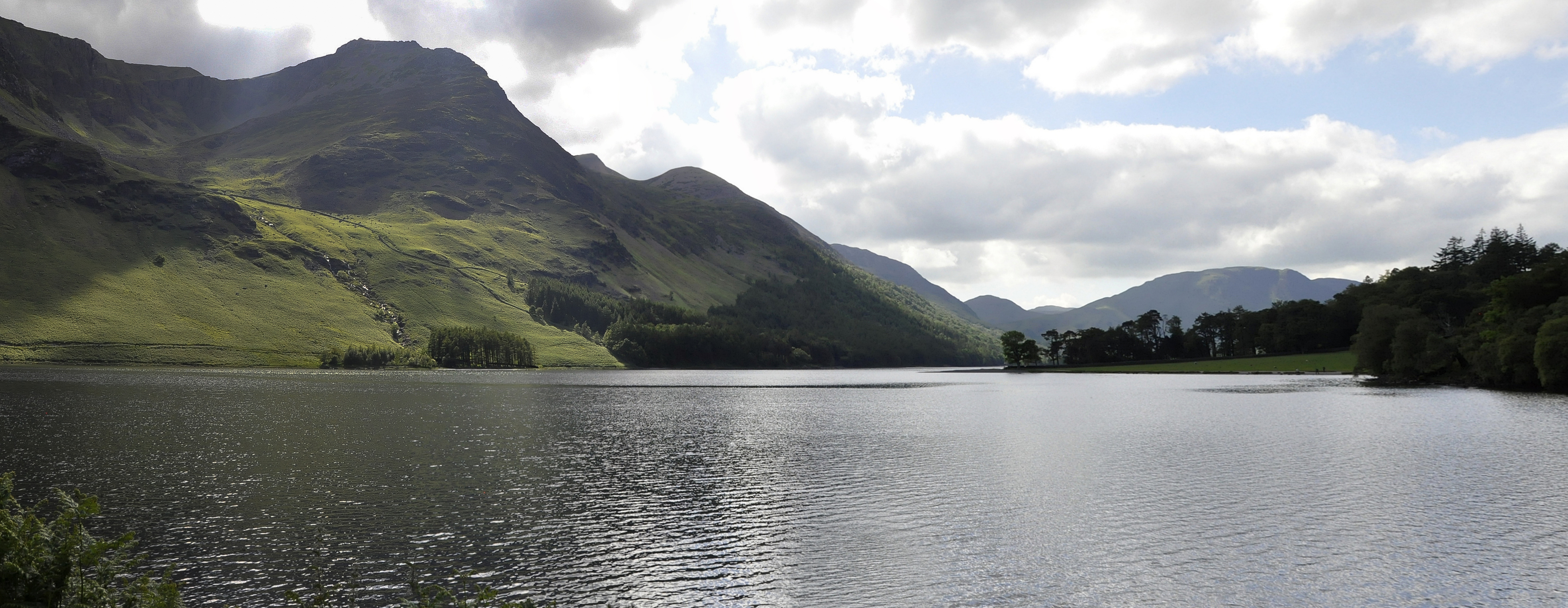 Buttermere, Lake District, Engeland